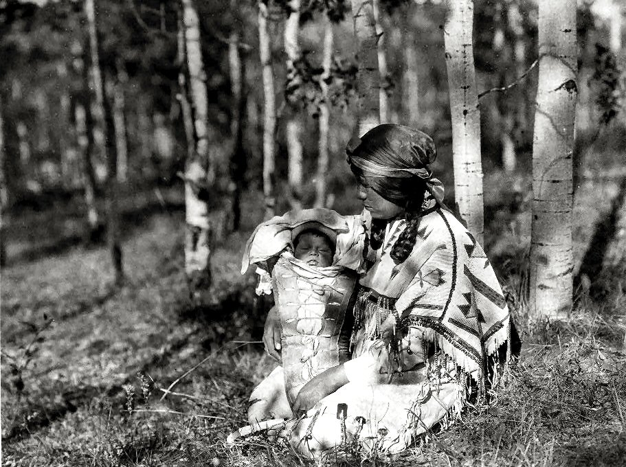 Edward Sheriff Curtis el 1928 fotografià una mare assiniboine i el seu fill.